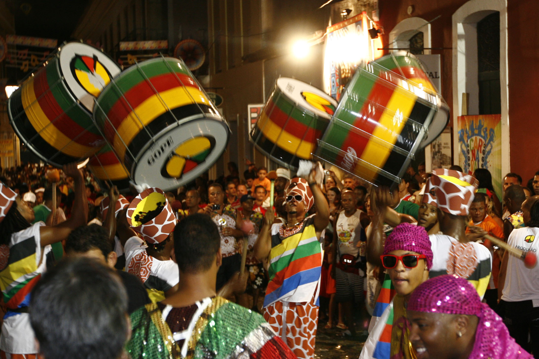 Carnaval 2010 - segundo dia de festa no circuito batatinha no Centro Historico de Salvador